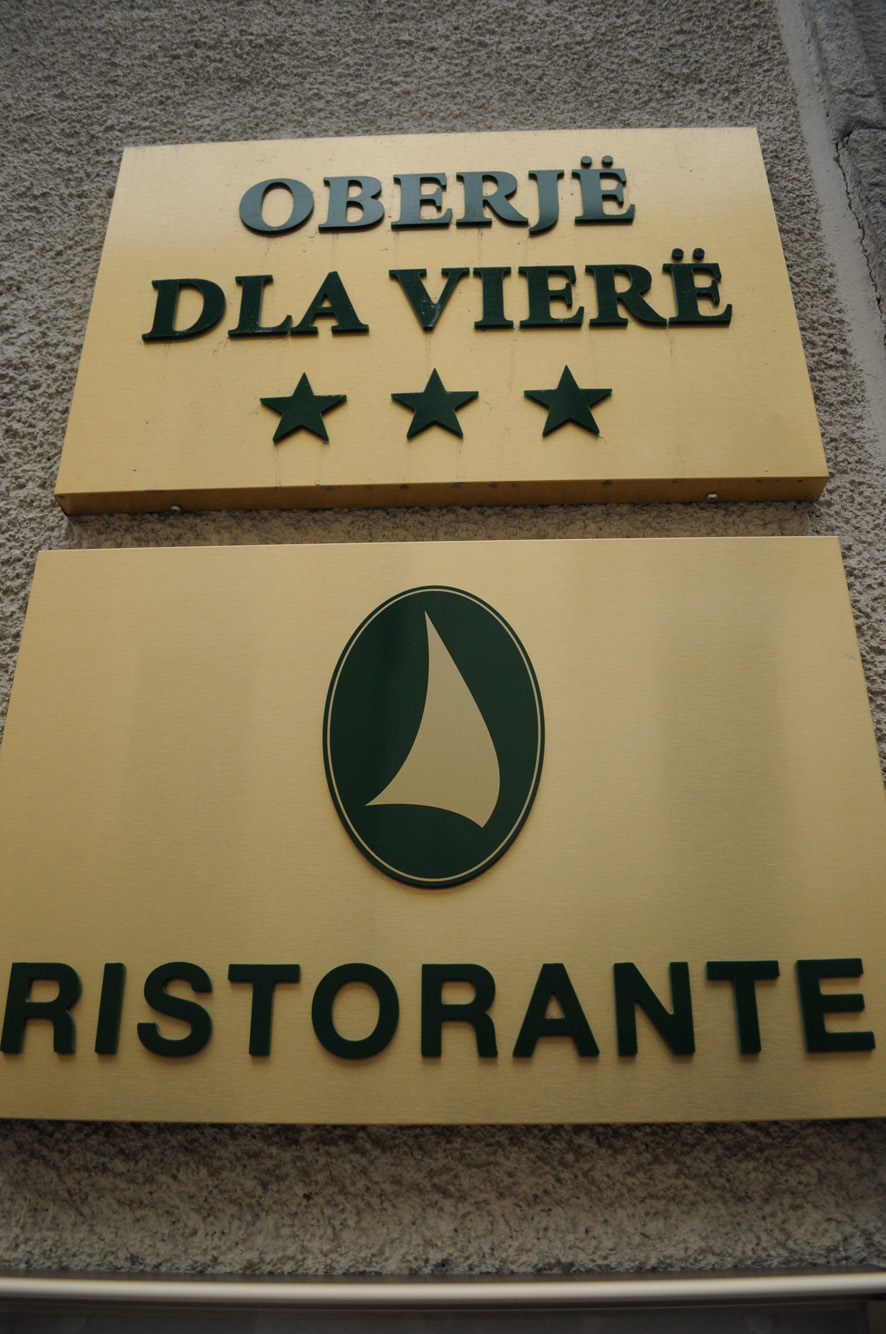 Paneu en